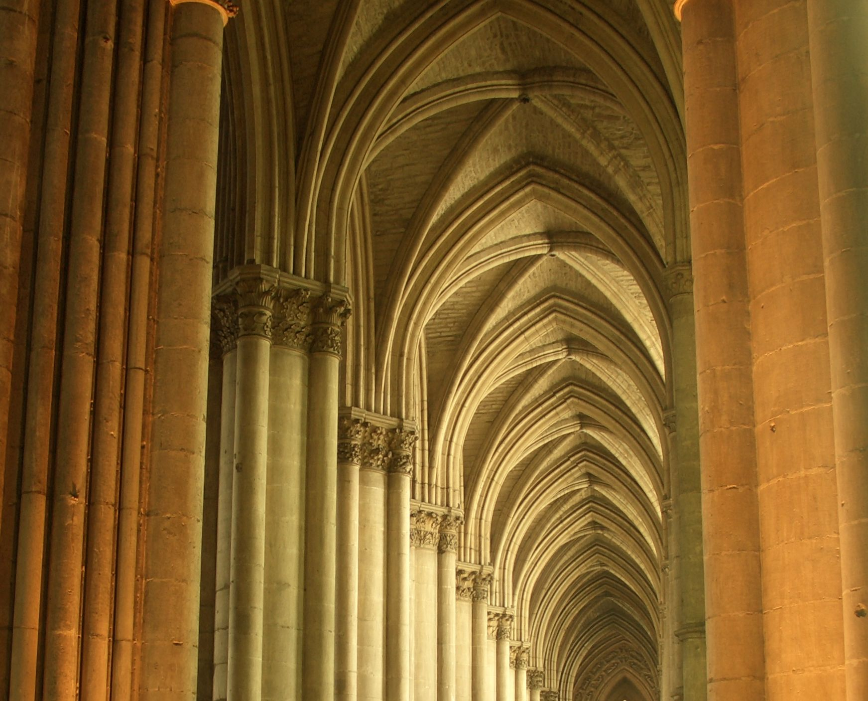 Catderal de Reims - Interior